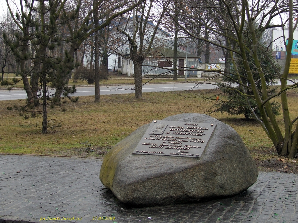 Obelisk Gen.Leopolda_Okulickiego